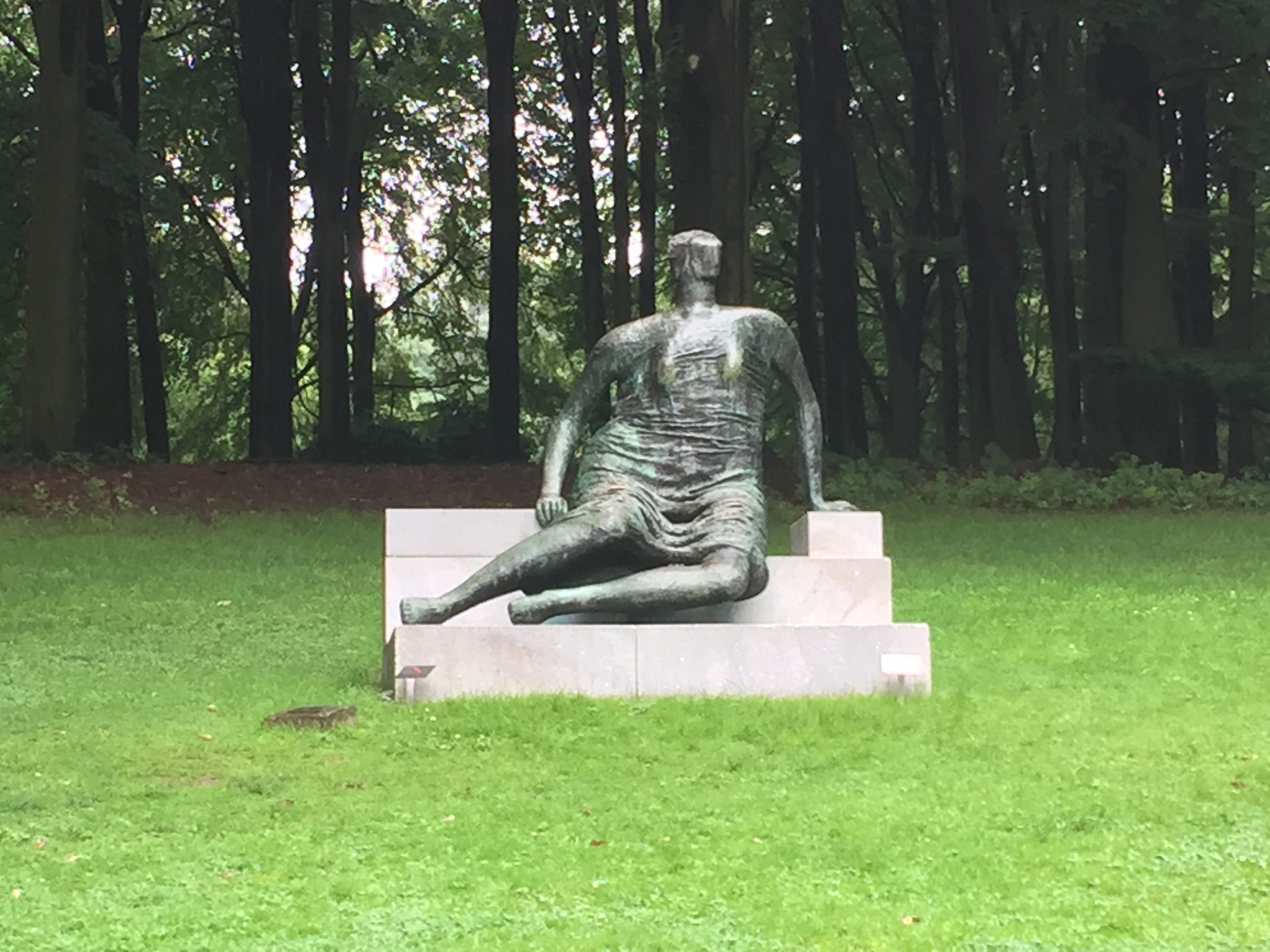 Skulpturenpark, Wuppertal